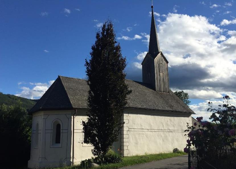 Kath. Filialkirche hl. Johannes Steindorf am Ossiacher See